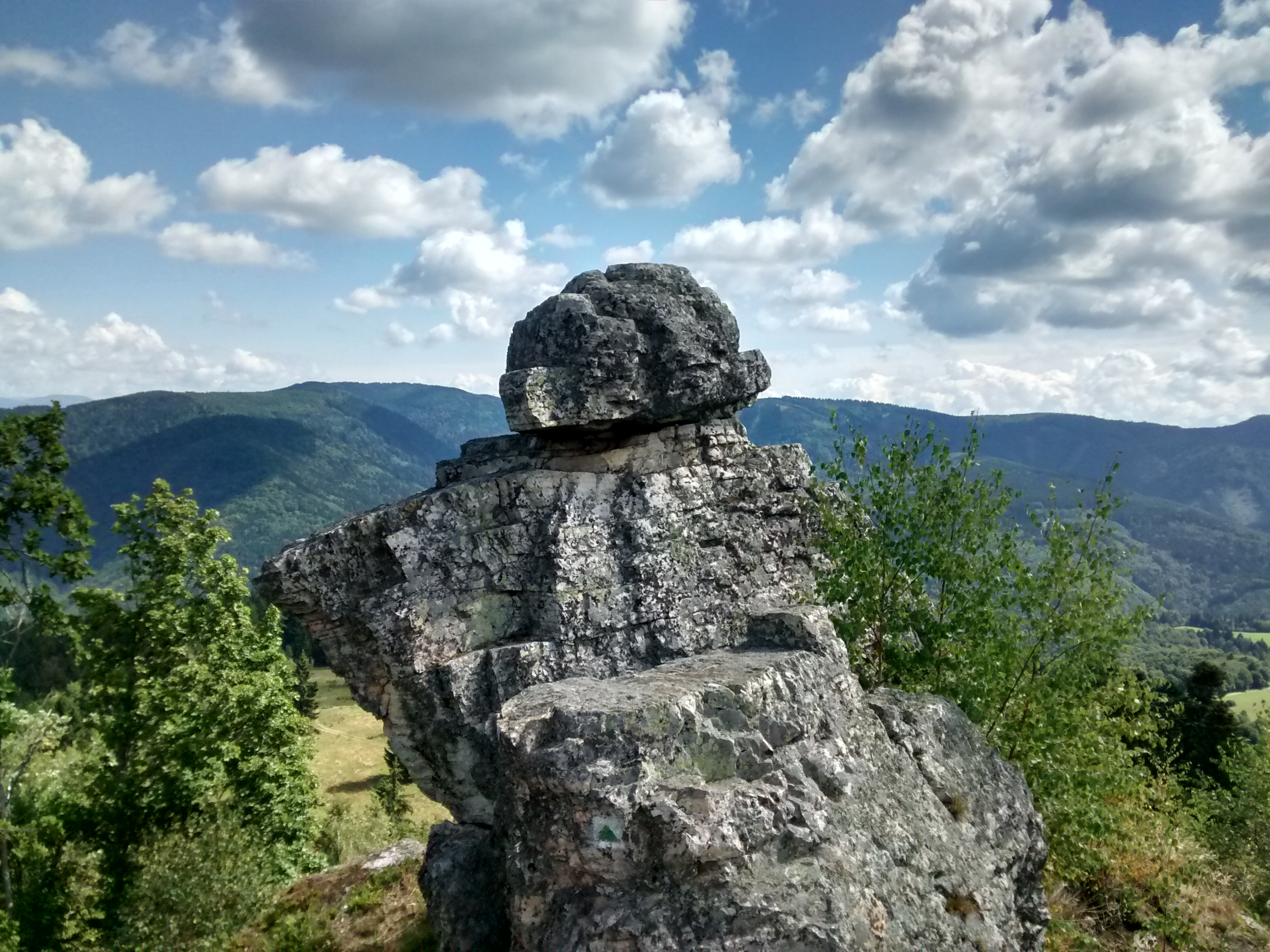 K vrcholu vedie odbočka zo zelenej turistickej trasy Ľubietová - Brusno.